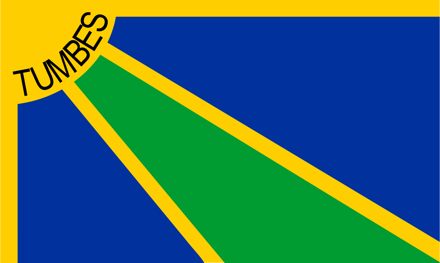 Esta es la Bandera de la Ciudad de Tumbes, capital del Departamento de Tumbes.